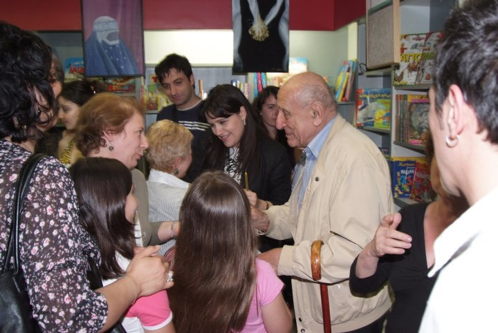 Arnoldo Foà in occasione di una serata da Pellicanolibri; 2008